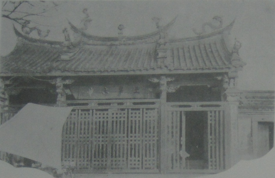 1933年前的臺南天壇